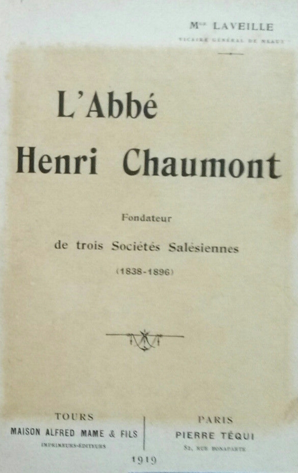 Mgr Laveille, L'Abbé Henri Chaumont, fondateurs de trois sociétés salésiennes, Paris, éd. Téqui/Mame, 1919